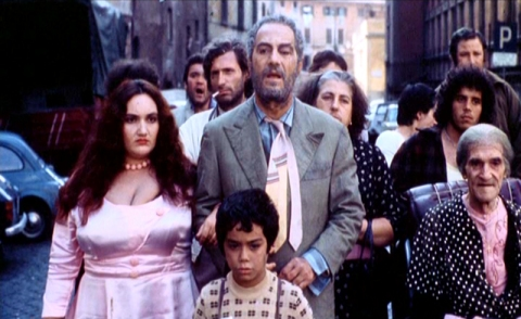 Képkocka a „Csúfak és gonoszak” című filmből